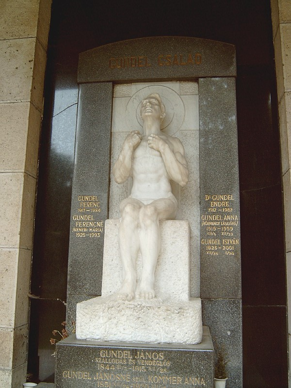 Gundel János sírja Budapesten. Kerepesi temető: Á. B. 26. Gách István Lipót alkotása. Árkádos temetőépületek a bennük álló síremlékekkel, Krátky-Könyöki-Gerle-Heuffel-Berényi, Hőgyes Endre, Korányi Sándor-, és Frigyes, a Gundel-család, Jungfer Gyula sírjai. 1905-1908. (a 10-11-19-18-as parcellák között) This is a photo of a monument in Hungary. Identifier: 928